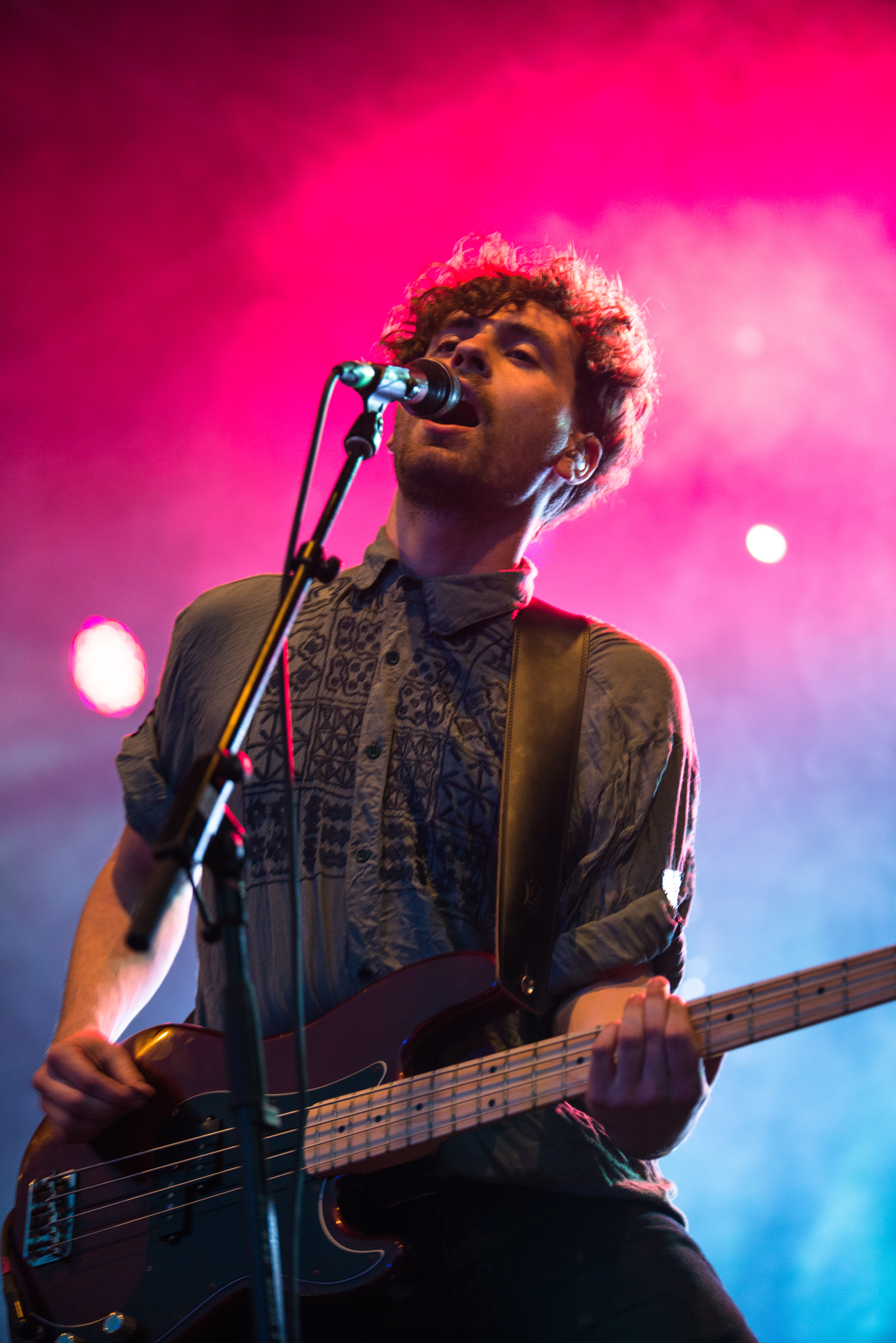 de